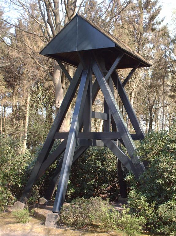 Klokkenstoel in Rottevalle